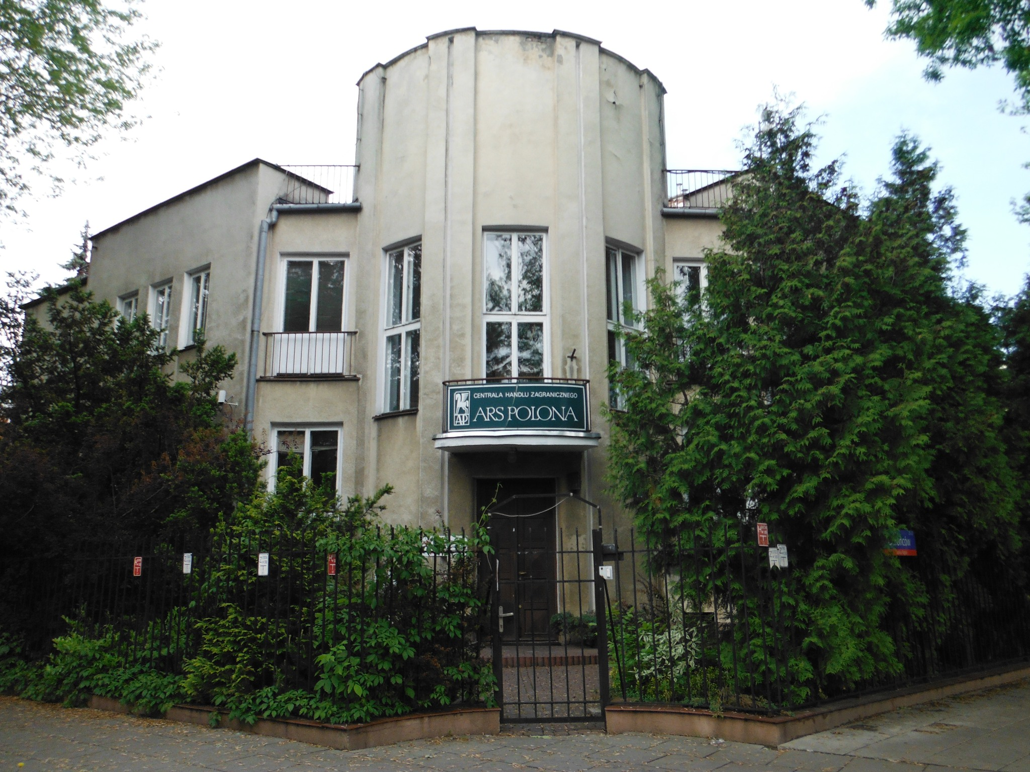 Willa Felicji Trębickiej (ul. Obrońców 25 w Warszawie), zaprojektowana przez Stanisława Nowickiego, prawdopodobnie ok. 1934.